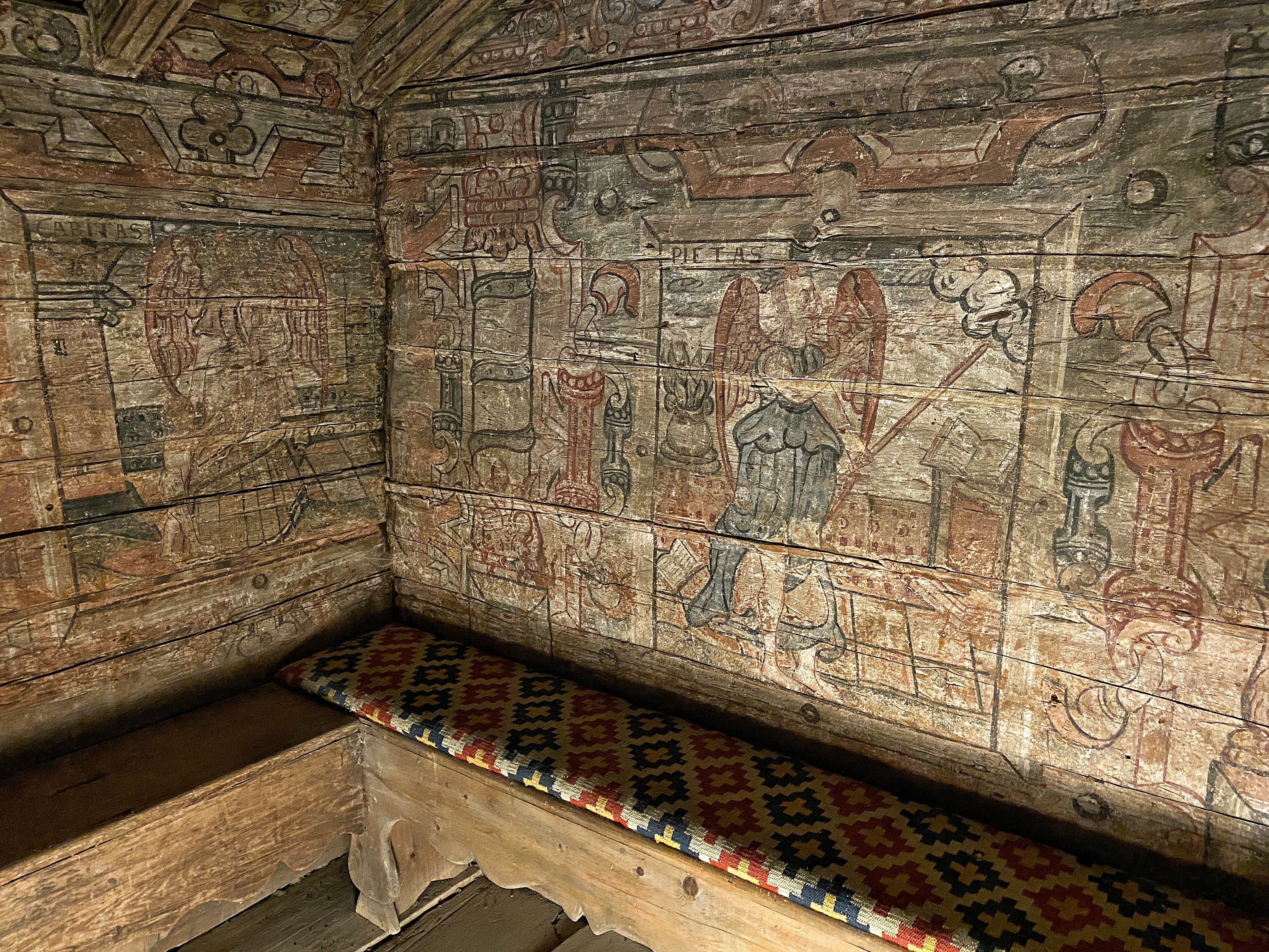 Detalj av väggmålningar i Tovastugan i Nyköping.